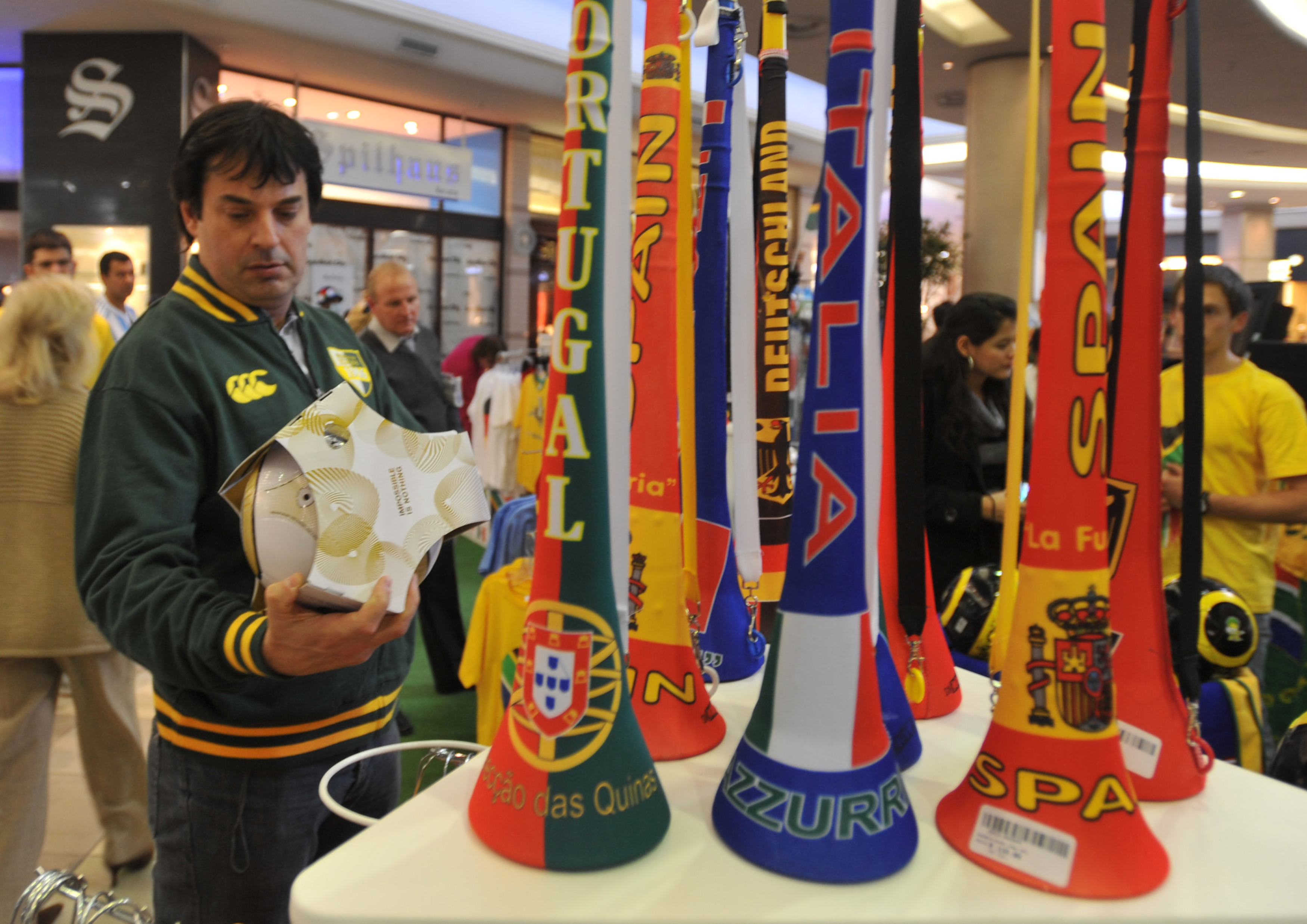 Johannesburgo - Artigos da Copa do Mundo são campeões de vendas em shoppings da cidade.